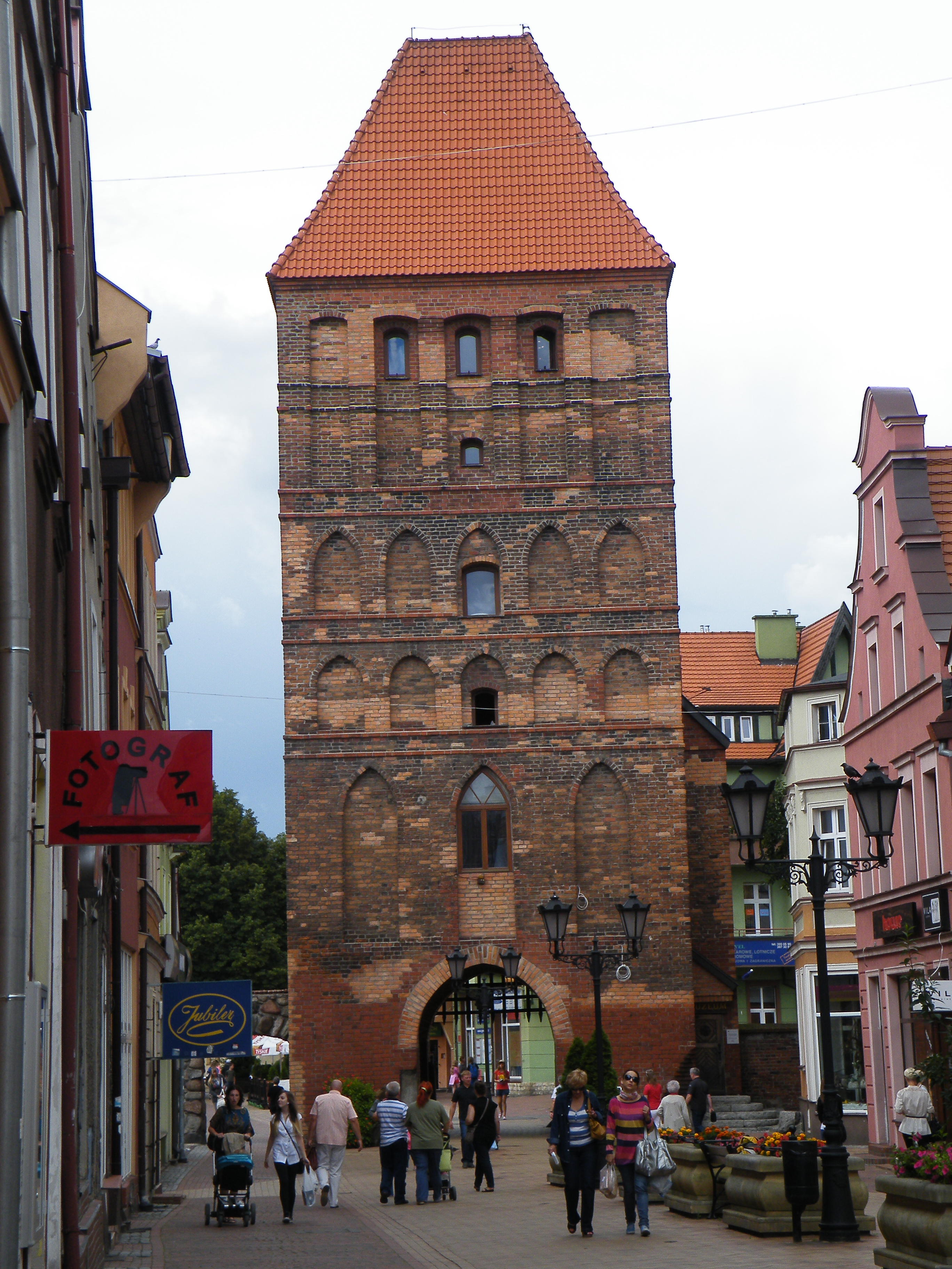 Chojnice - Brama Człuchowska, pięciokondygnacyjna brama z połowy XIV w. Obecnie Muzeum Regionalne.